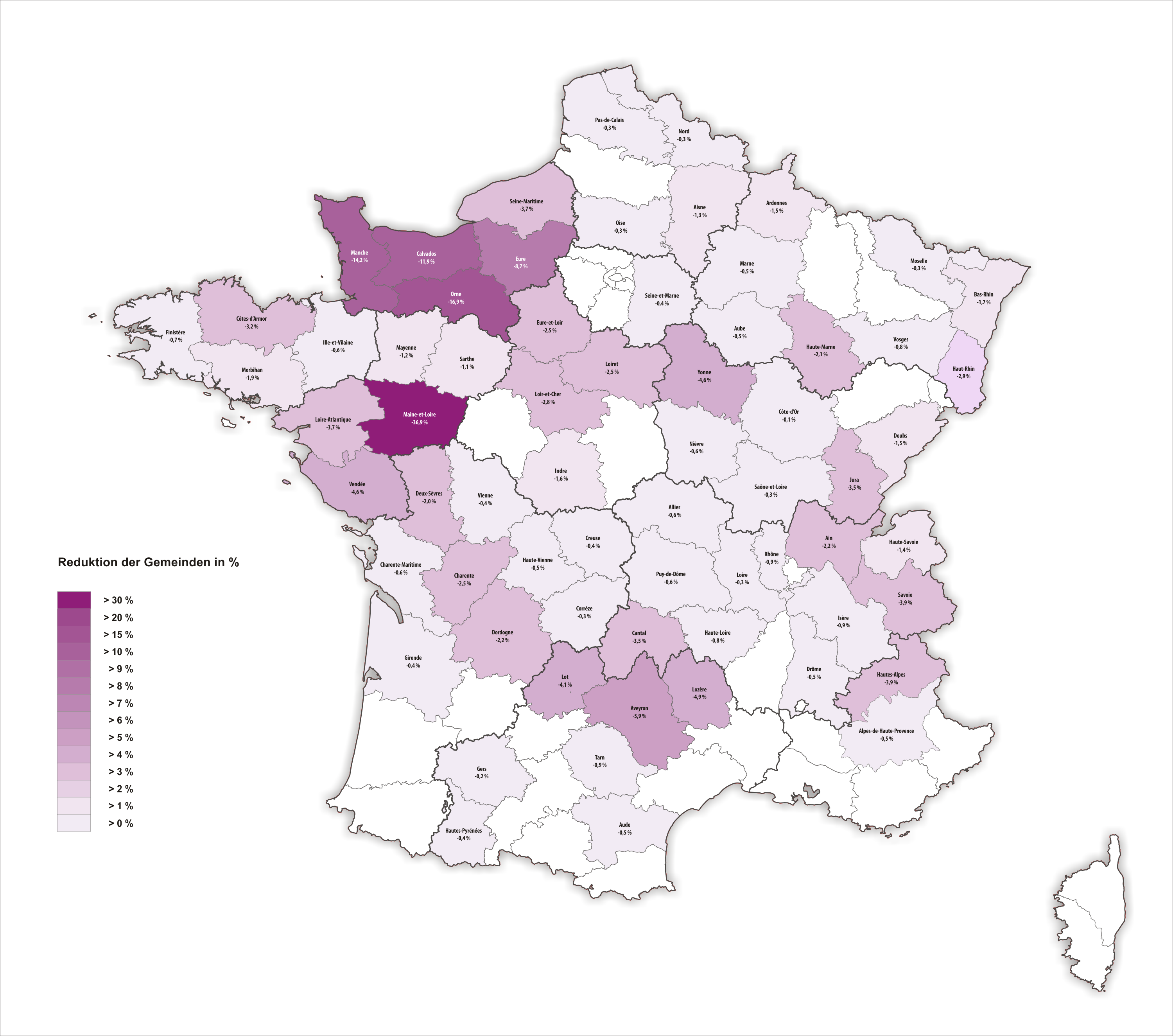 Reduktion der Gemeinden in Frankreich durch Fusionen pro Département 2016